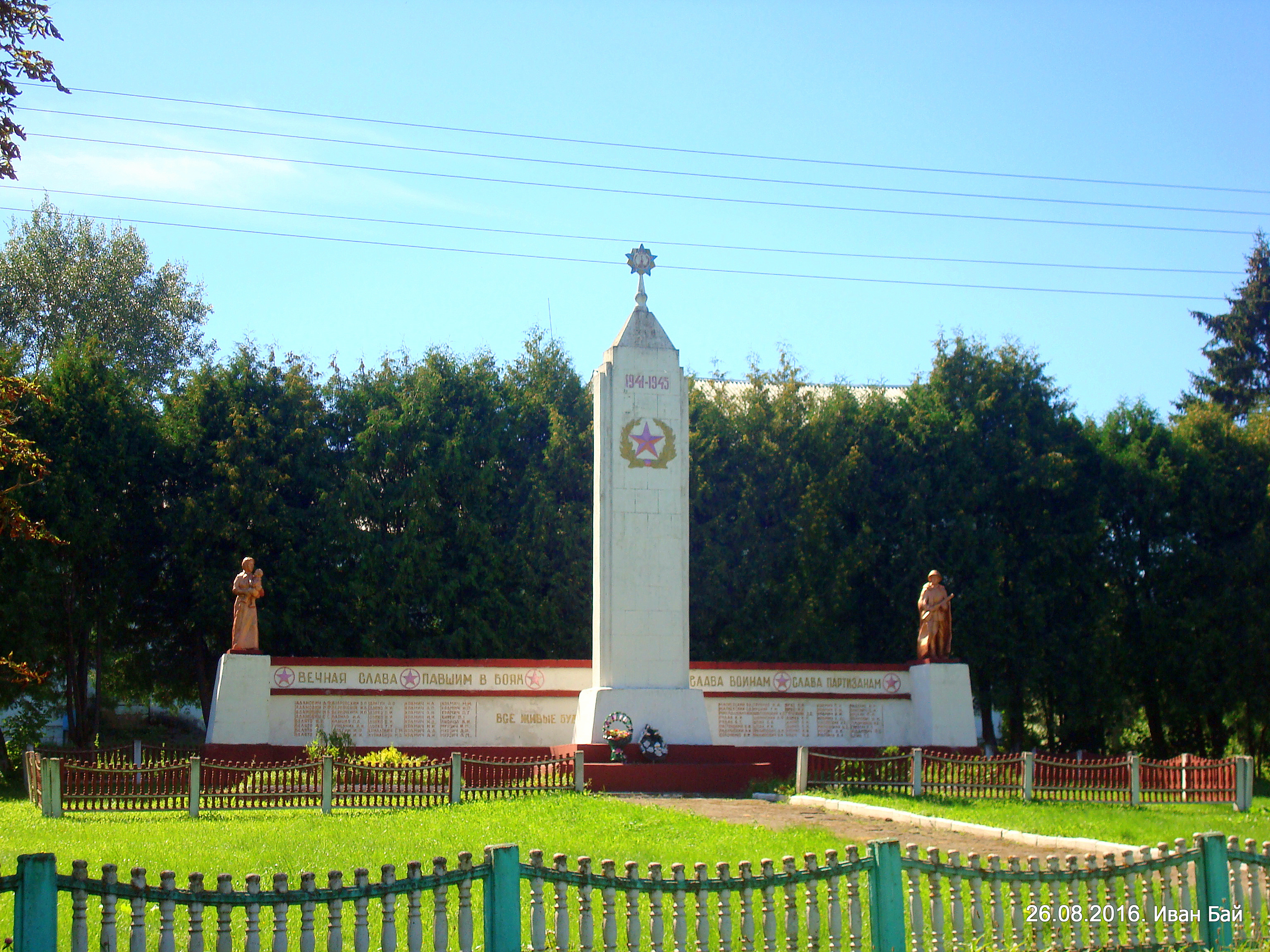 Памятник